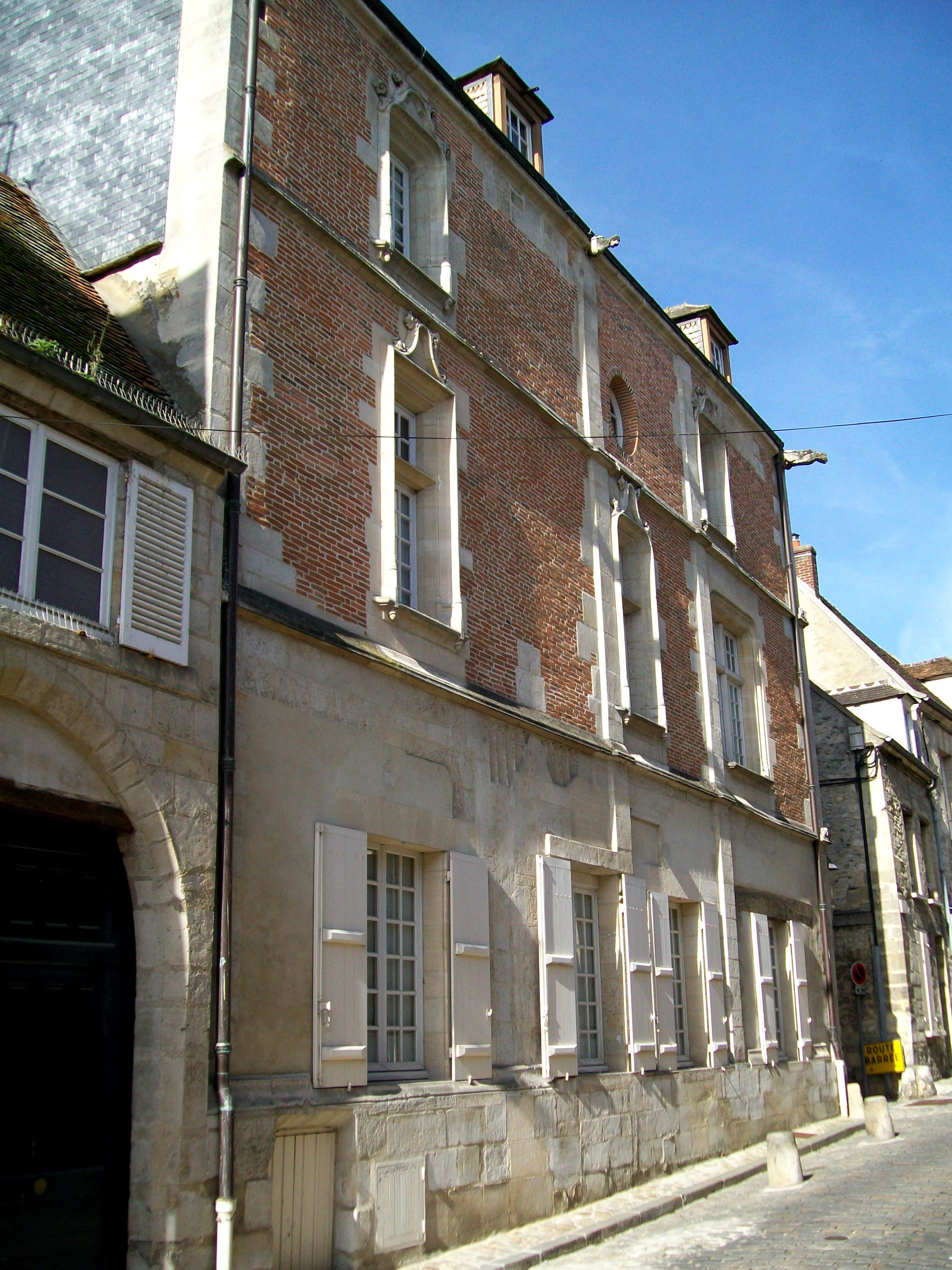 Le « logis du Haubergier » est un hôtel particulier de 1522 qui a abrité le musée régional d'archéoologie et d'histoire entre 1927 et 1982 ; façade sur la rue Sainte-Geneviève.